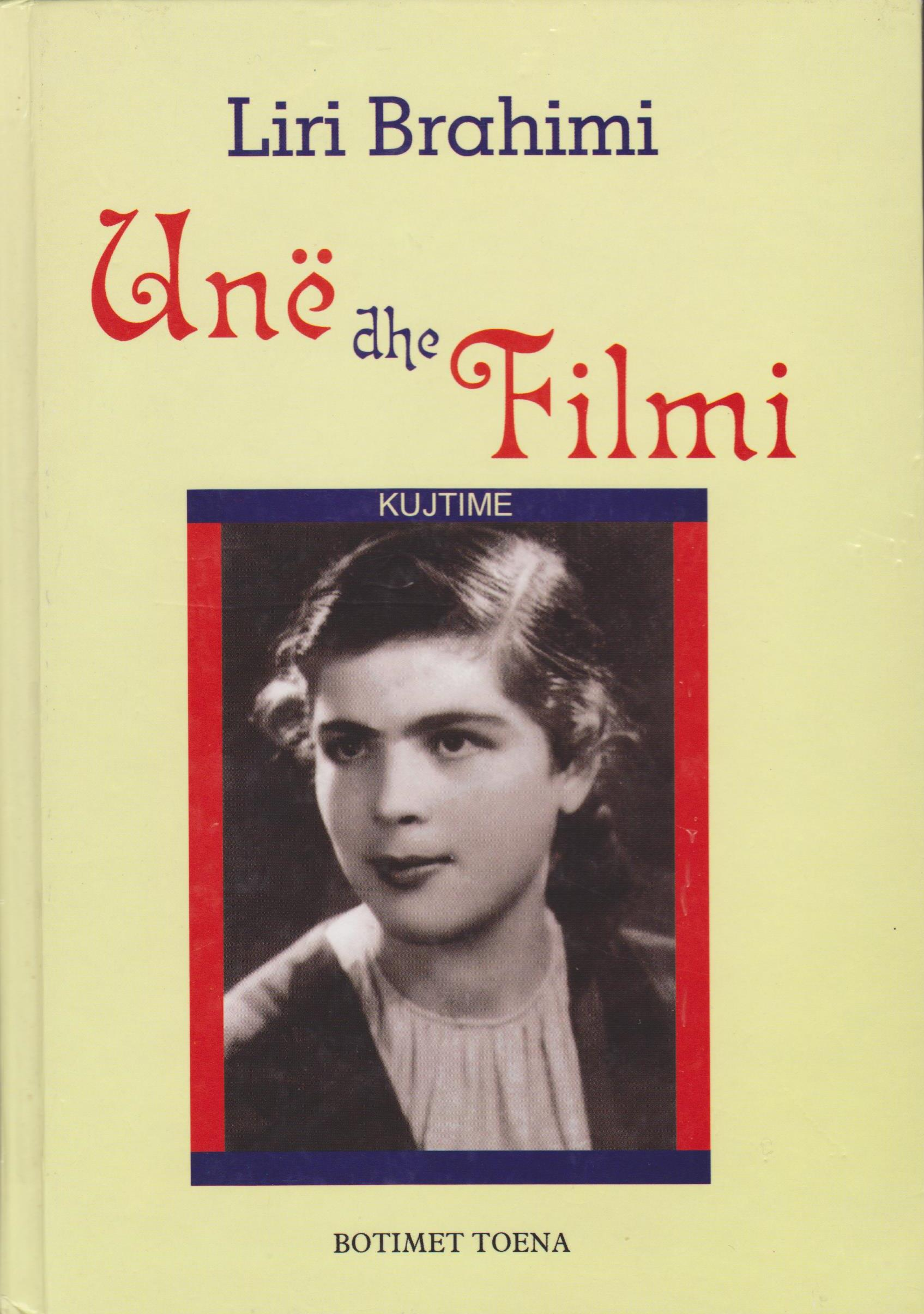 Libër me kujtime, i autores Liri Brahimi